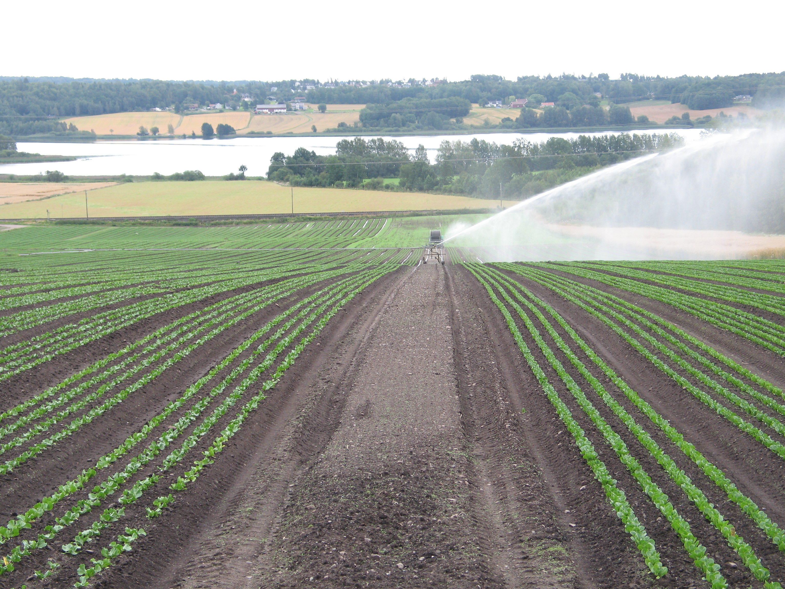 Salatdyrking Rensgata Stokke